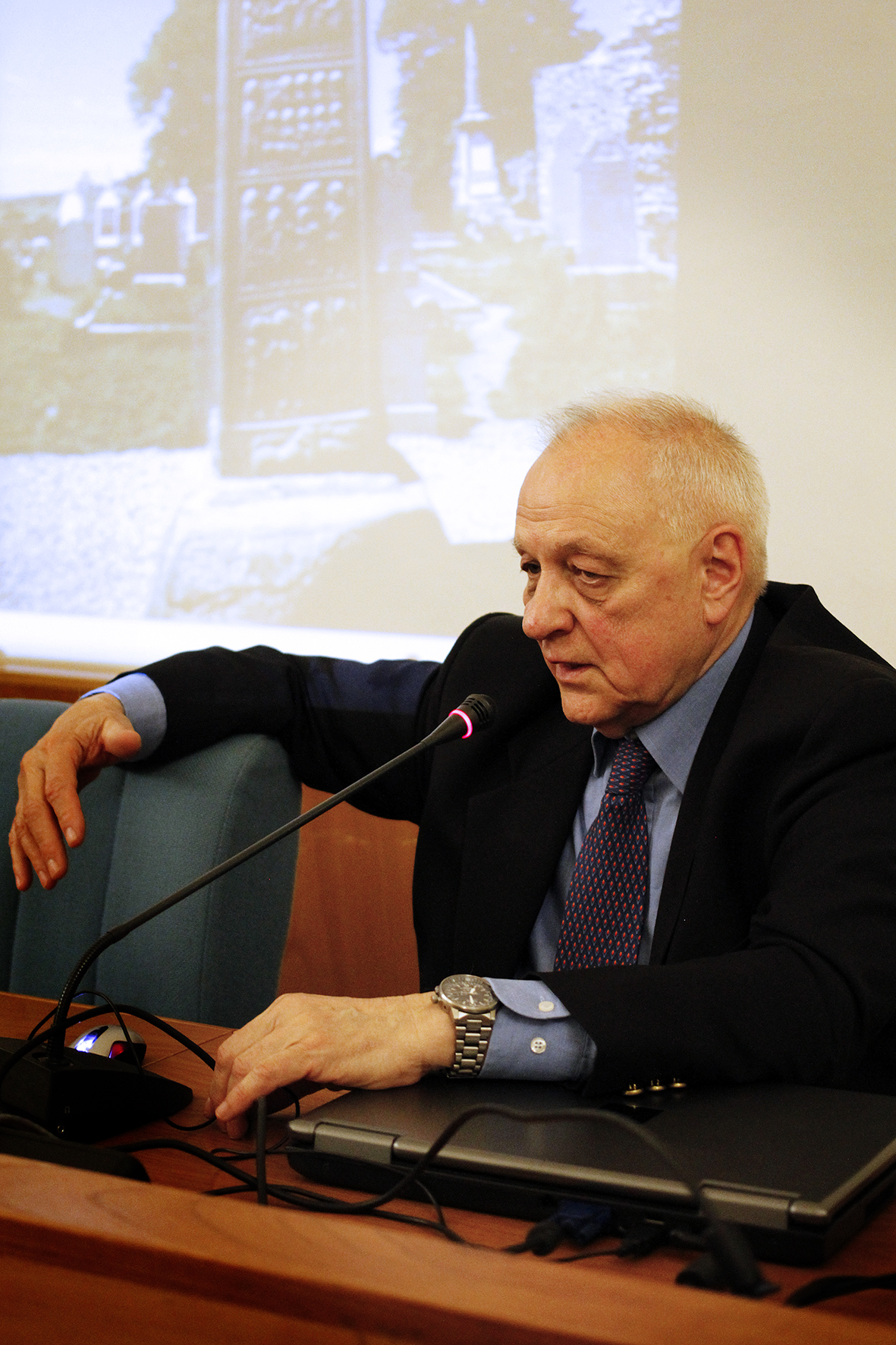 Venceslas Kruta, Aosta, 24. 4. 2015